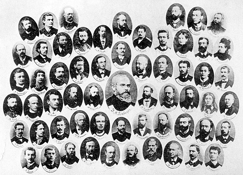 Mitglieder der Volapük-Akademie, um 1887. Fotocollage mit z.T. deutlich älteren Porträts. Abgebildet u. benannt u.a.: Johann Martin Schleyer (Mitte); oben links: E. Lourdelet, ?, v. Tauffkirchen; oben rechts: Georg Banfi, José da Silva Teixeira, Heinrich Stadelmann?; 2. Reihe links: Cesare Tedeschi, C. Schmidt, R. Kiraly, Fernández Iparraguirre, Eugen Bieck; oben Mitte: Henry Harrison; 2. Reihe rechts: Karl Arnold, Karl Lenze, Susanne Pallier, Gustav Liedbeck, ?; 3. Reihe links: Emil Sonderegger, Elsa Schneider d'Arno, Hippolyte Guigues, Juraj Bauer, Rupert Kniele; 2. von oben Mitte: ?; 3. Reihe rechts: Alfred Kirchhoff, T. C. Winkler, I. C. Aaen, Maria Johanna Verbrugh, Angelo Ferretti; 4. Reihe links: Franz Wolf, Anton Hauptmann, Harald Christian Rönne, H. van de Stadt, Moritz Obhlidal; 4. Reihe rechts: Auguste Kerckhoffs, Waldemar Rosenberger, Thaddäus Devidé, Henriette Wolter, August Nilson; 5. Reihe links: Ivan Cholin, Eduard Gutensohn, Rudolf Lange, Josef Hagmann, Arthur Heyligers; Mitte: Anton Colling; 5. Reihe rechts: Josef Schmidjörg, Ion P. Licherdopol, ?, ?, Julius Lott; 6. Reihe links: Ernst Enna, Wilhelm Hansen, Augusto Actis, Leopold Einstein, Karl Dornbusch?; 6. Reihe rechts: Joseph Holden, Karl Gross, H. Müller, ?, ?